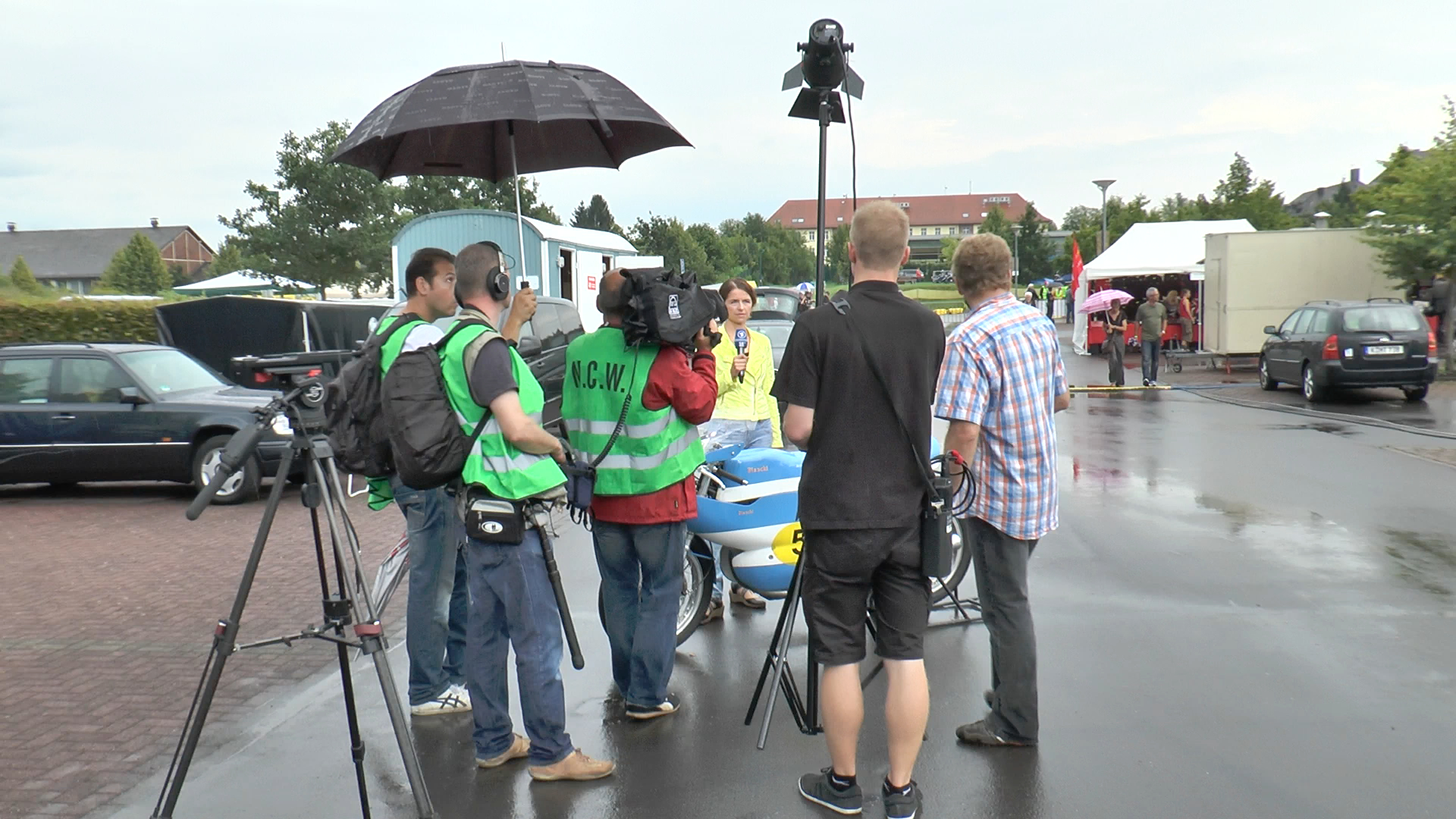 EB-Team des Saarländischen Rundfunks an der Wendelinuspark-Rennstrecke in St. Wendel anlässlich der 4. Motorsport-Klassik am 10. August 2014.